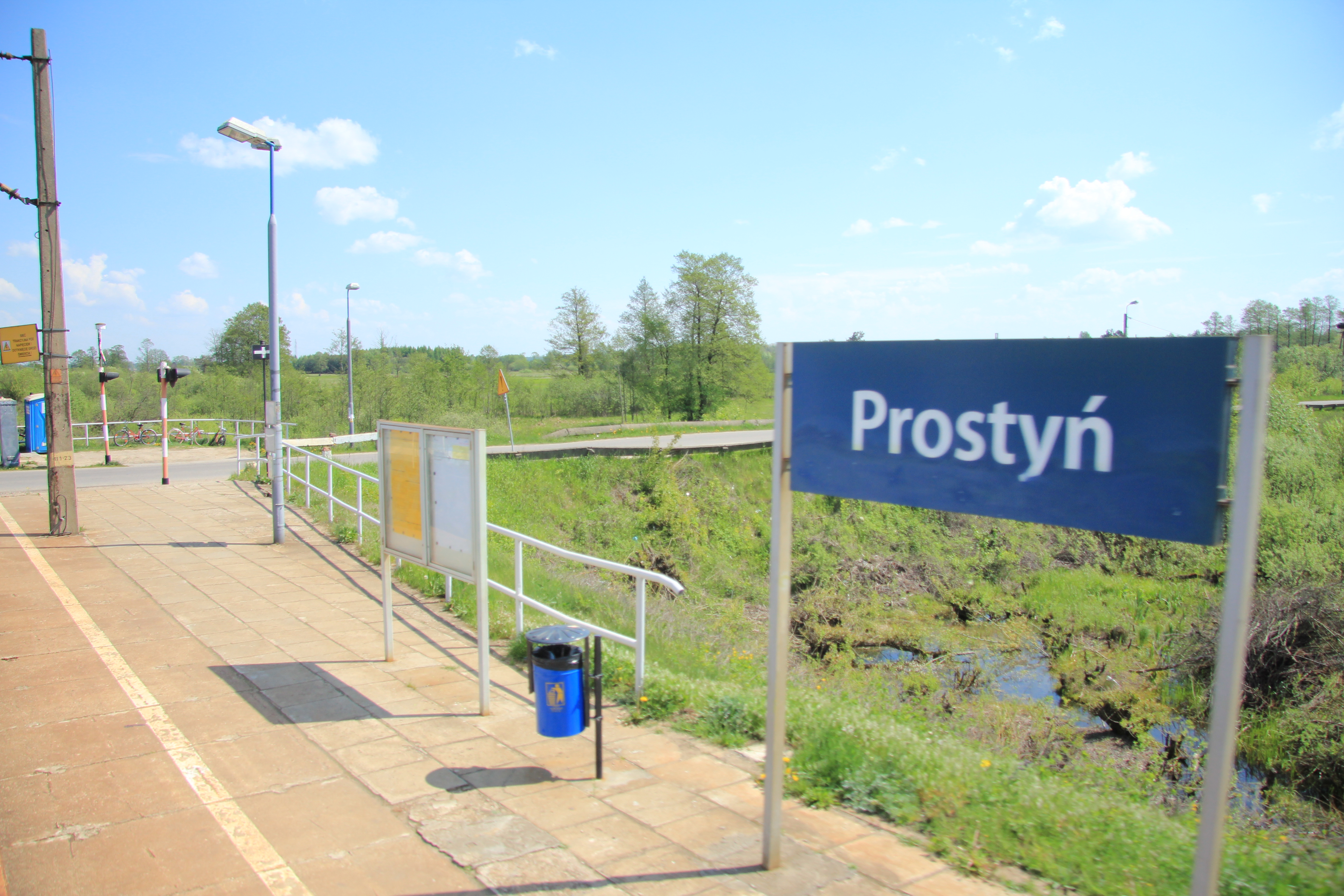 Prostyń przystanek kolejowy - woj. mazowieckie